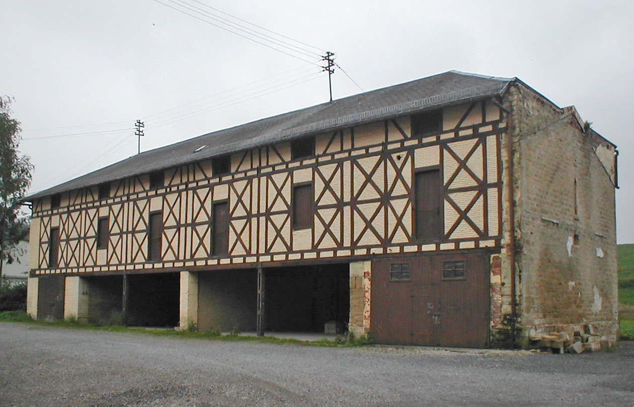 Markantes Wirtschaftsgebäude beim Schloss Grombach